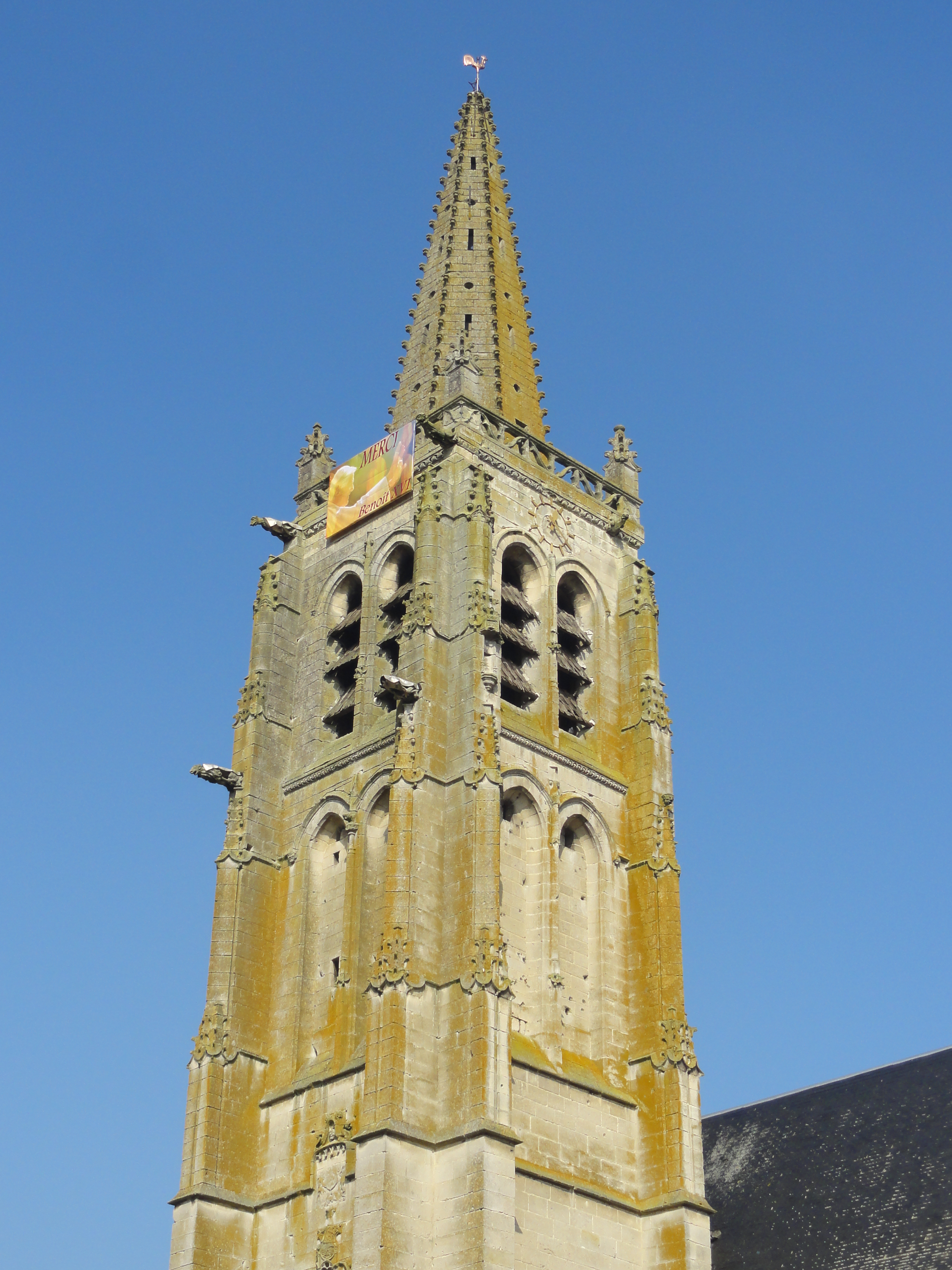 Le clocher.